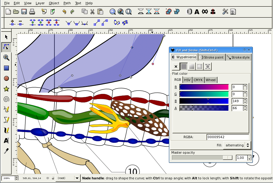 Rahmenfarben und Rahmenstärken mit SVG.